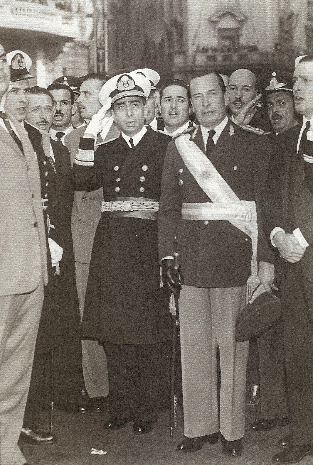 Almirante Isaac Rojas y General Pedro Eugenio Aramburu. Revolución Libertadora (1955-1958). Argentina.